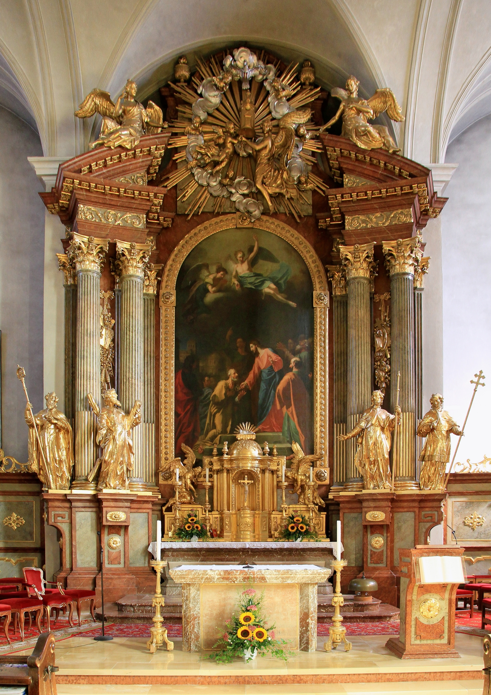 Hochaltar der katholischen Pfarrkirche hl. Petrus in der niederösterreichischen Marktgemeinde Purgstall. Ein monumentaler frühklassizistischer Doppelsäulenretabel-Altar aus den 1780er Jahren nach einem Entwurf von Andreas Zach und mit einem Altarbild von Carl Frister.